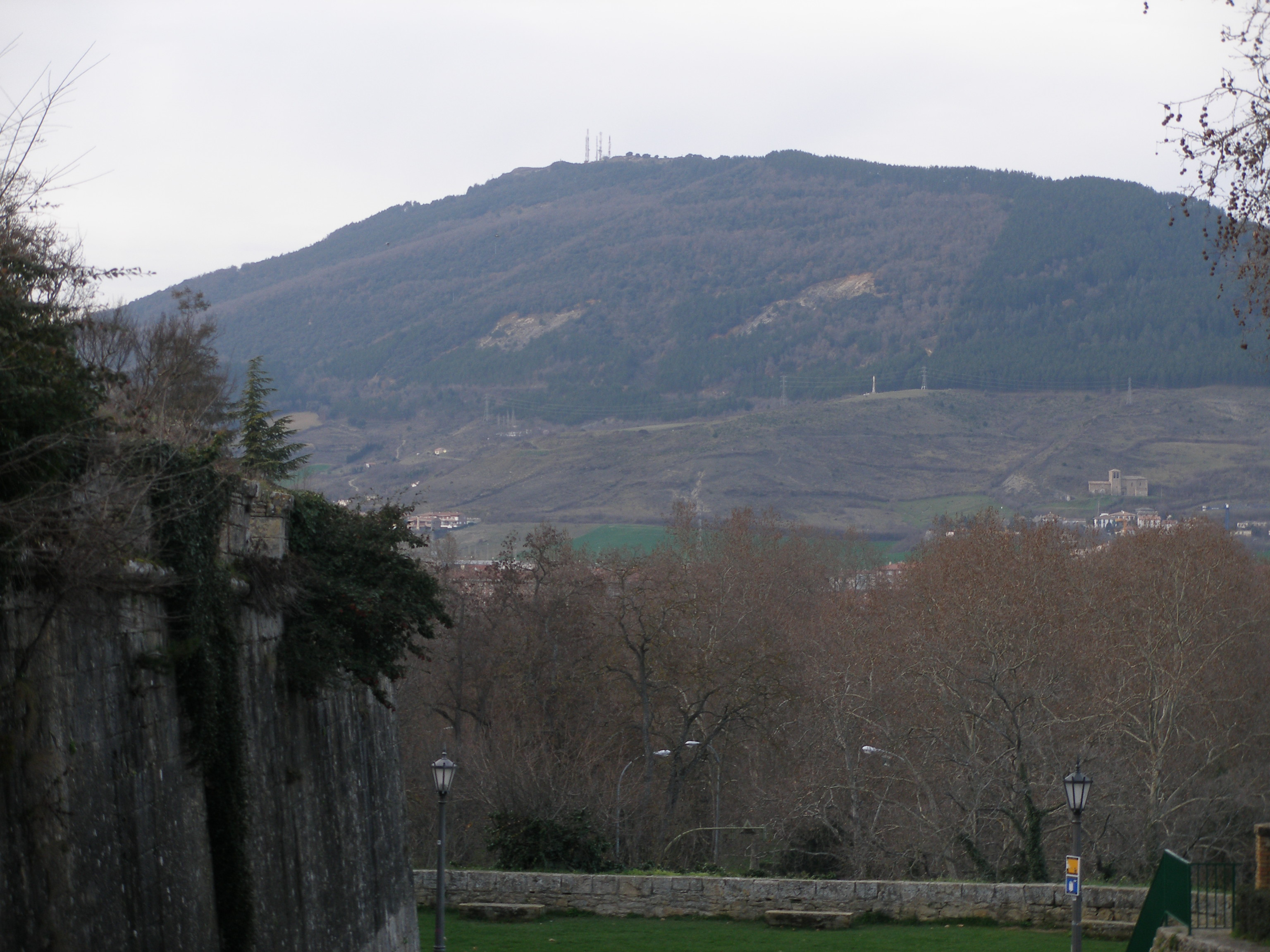 cara sur del monte Ezkaba